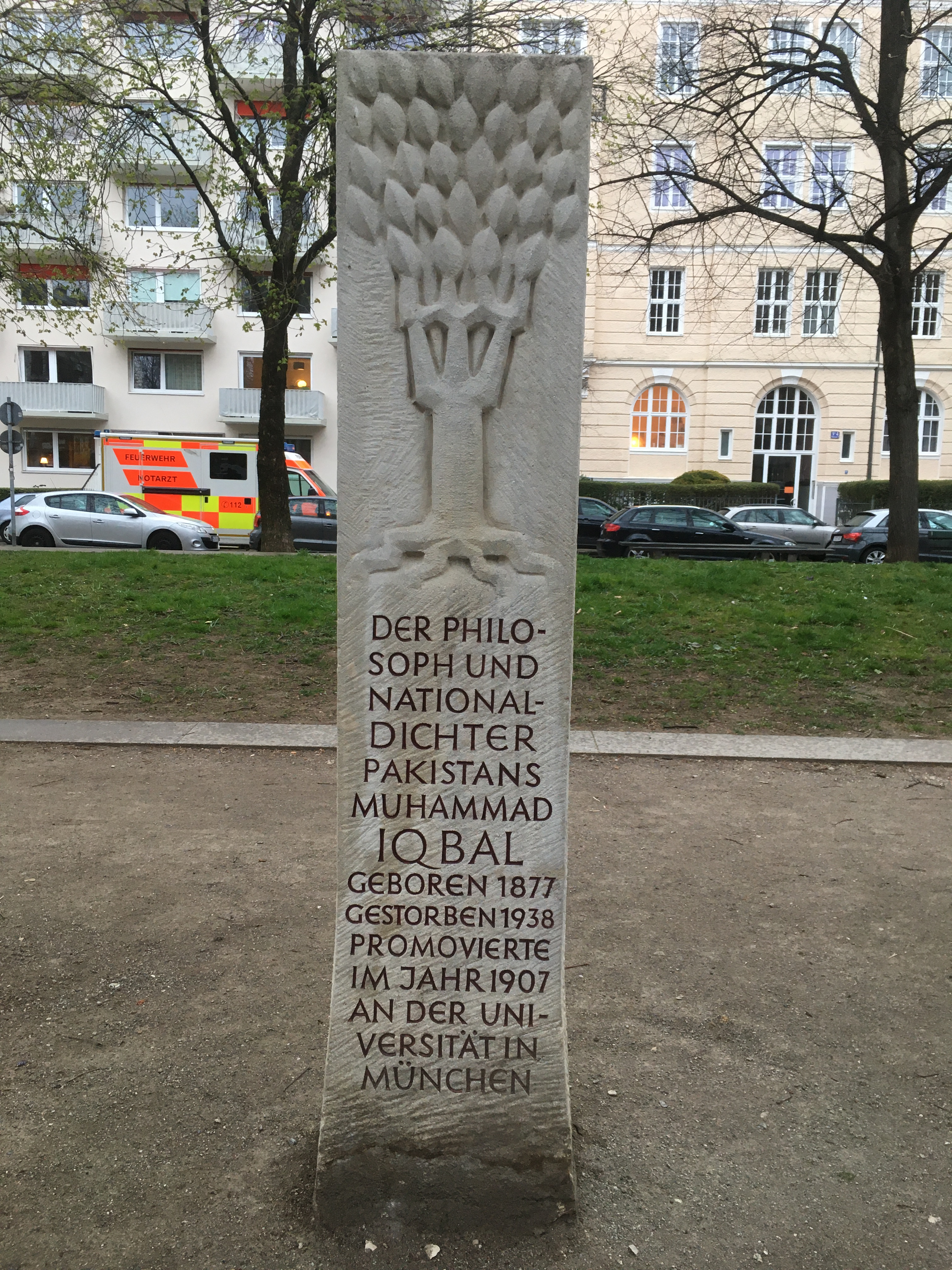 Erinnerungs-Stele für Muhammad Iqbal in München am Habsburger Platz zu seiner Promotion in dieser Stadt 1907.